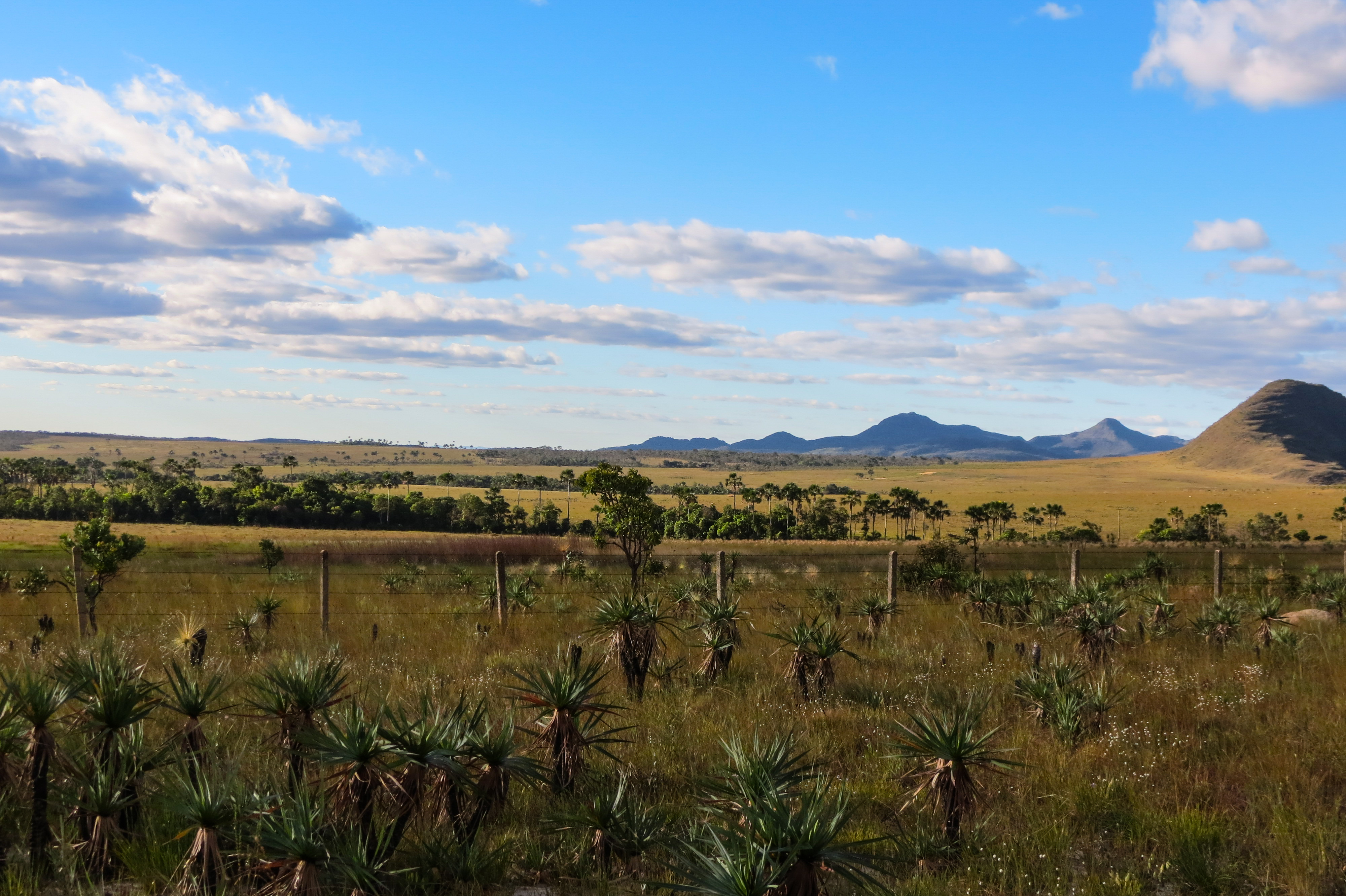 Vista do Jardim de maitreya e suas exuberantes candombás altamente inflamáveis